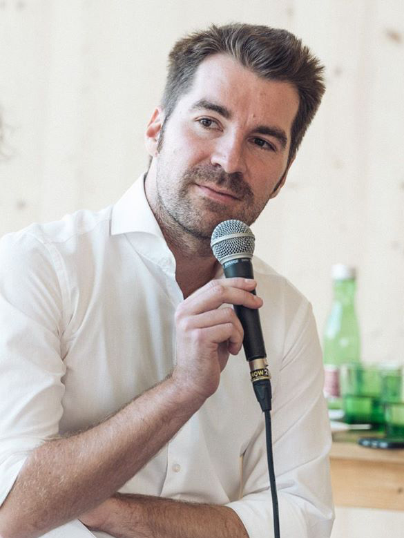 Gerhard Maier moderiert eine Poduimsdiskussion zum Thema "Digitalisierung im Bregenzerwald"